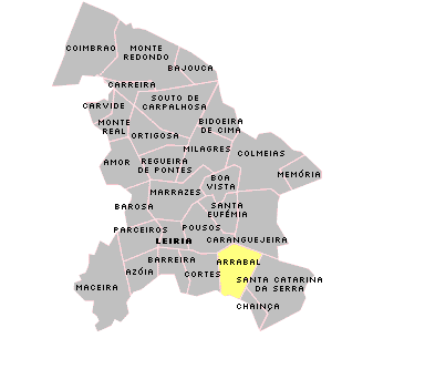 Localisation de Arrabal.PNG sur la freguesia de Leiria.